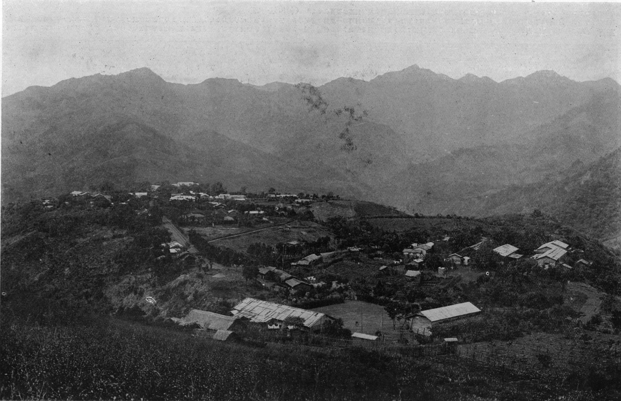 中文（台灣）: 角板山全景舊貌